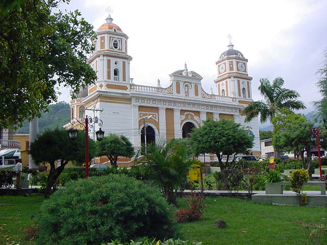 Produzione a 4 Mani Lodewijk Vadacchino -MeridaItalia, licenza cc-by-sa. l'Immagine Raffigurante Plaza Bolivar di [Ejido (Venezuela)